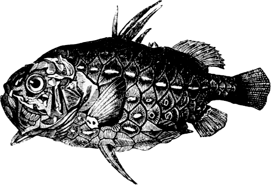 Pineconefish (Monocentris japonica)